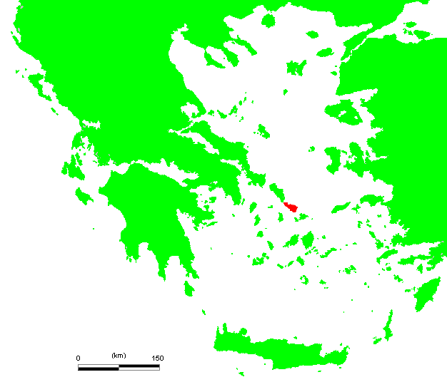 GR Tinos.PNG (Greek island)